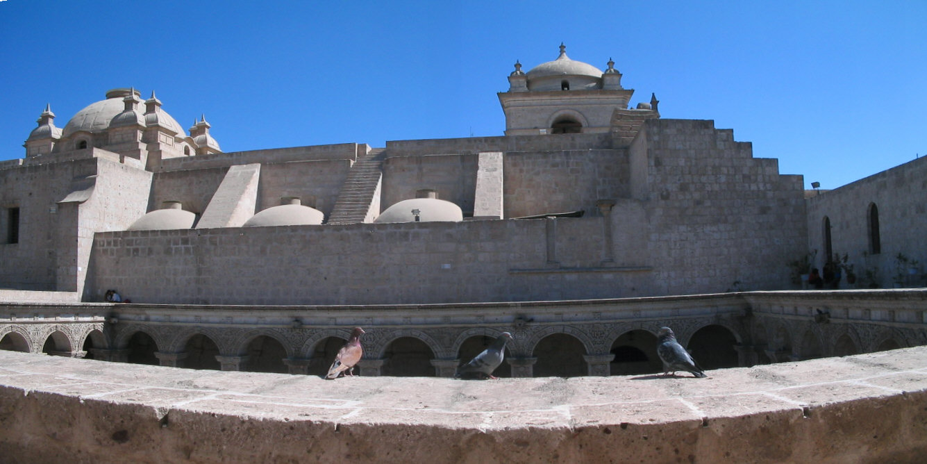 Vista de la Iglesia desde el claustro